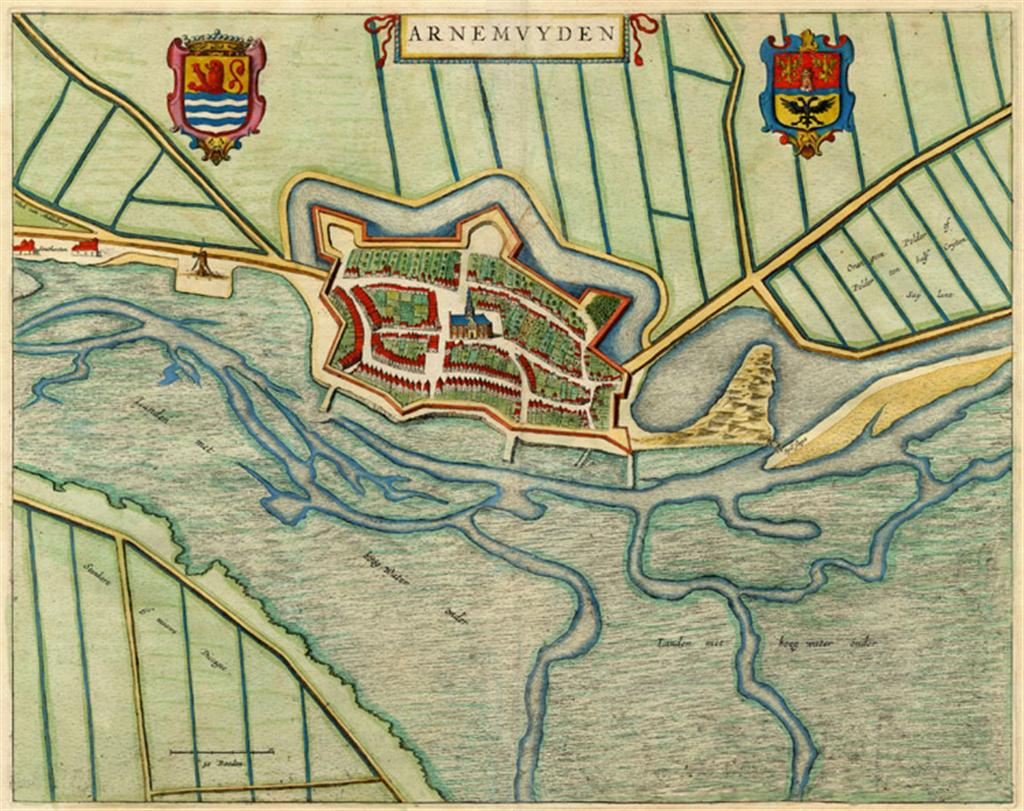 Arnemuyden, 41 x 53 cm